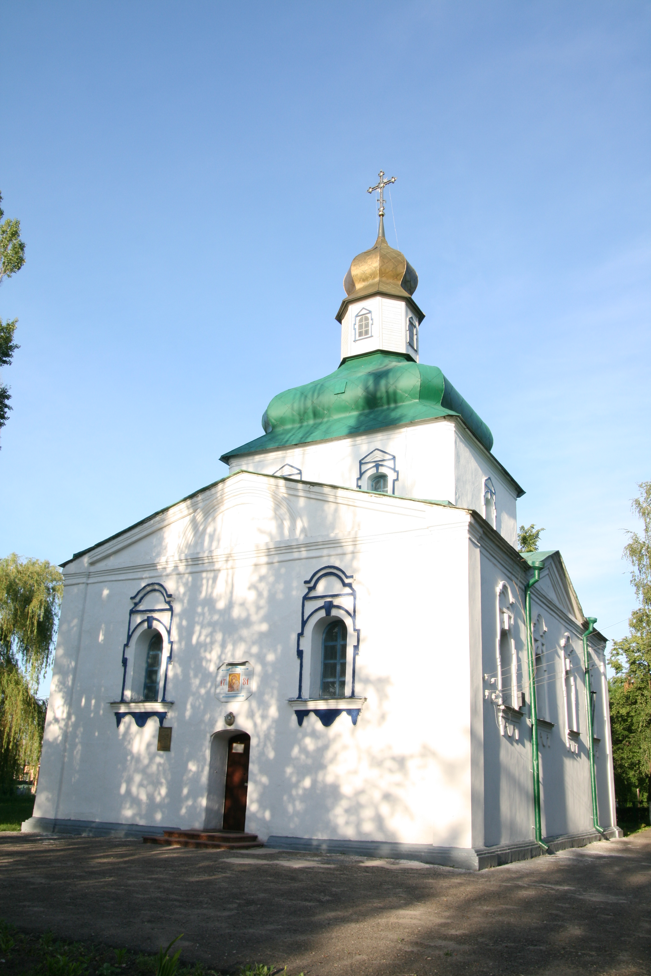 Собор Рiздва Богородицi (мур.) , Пирятин, пл.Борцiв Революцiї